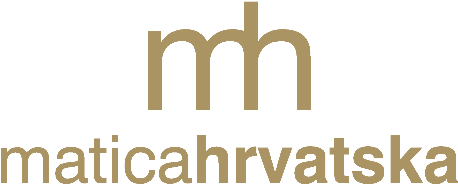 Matica hrvatska logo